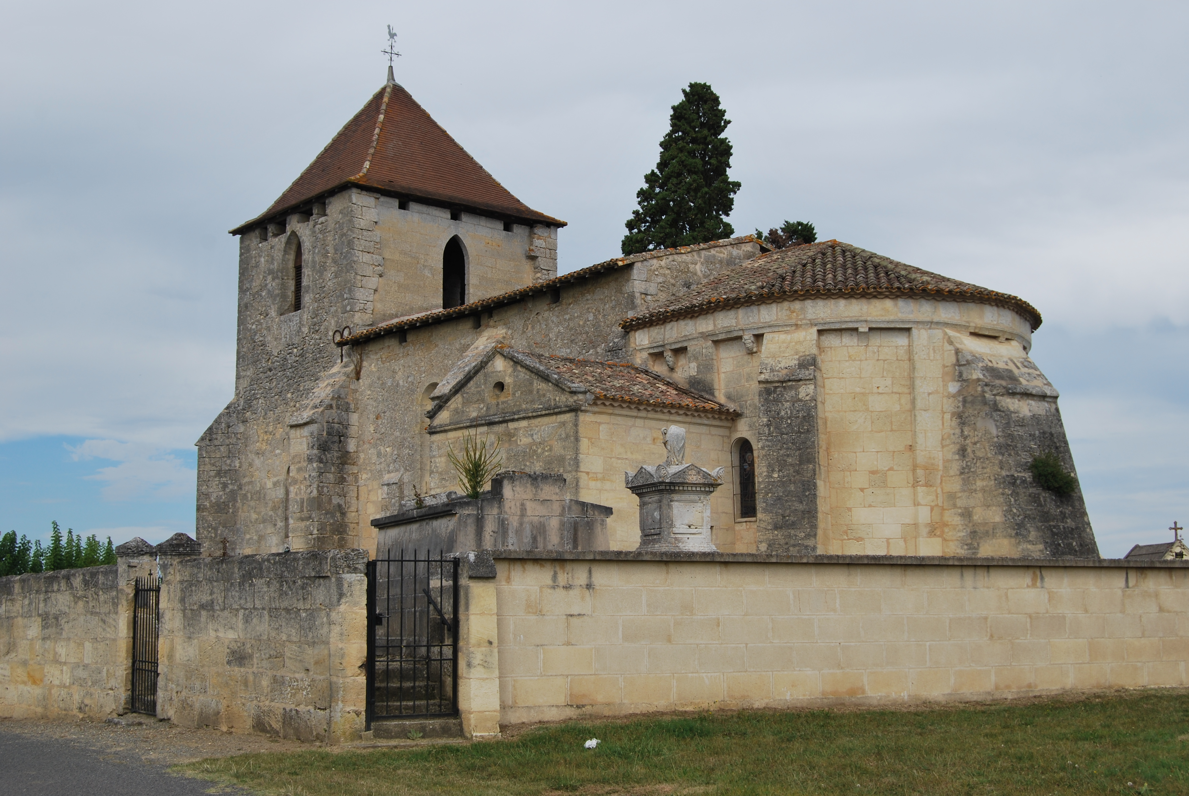 Église Notre-Dame de Tayac .